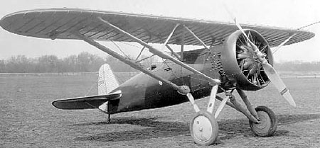 Boeing XP-15